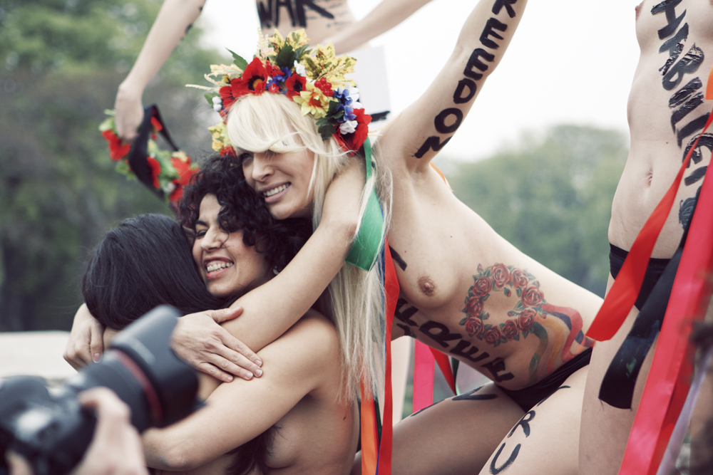 31 mars 2012